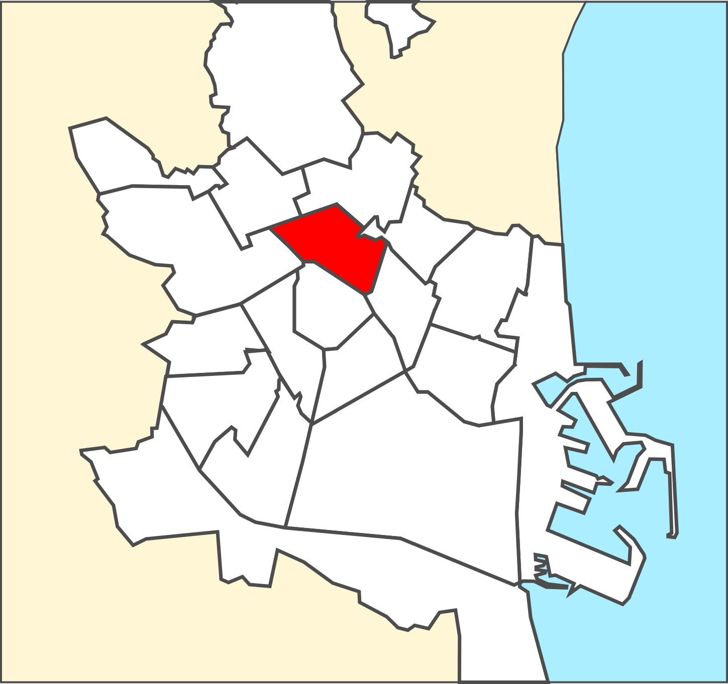 Districte de Jesús.